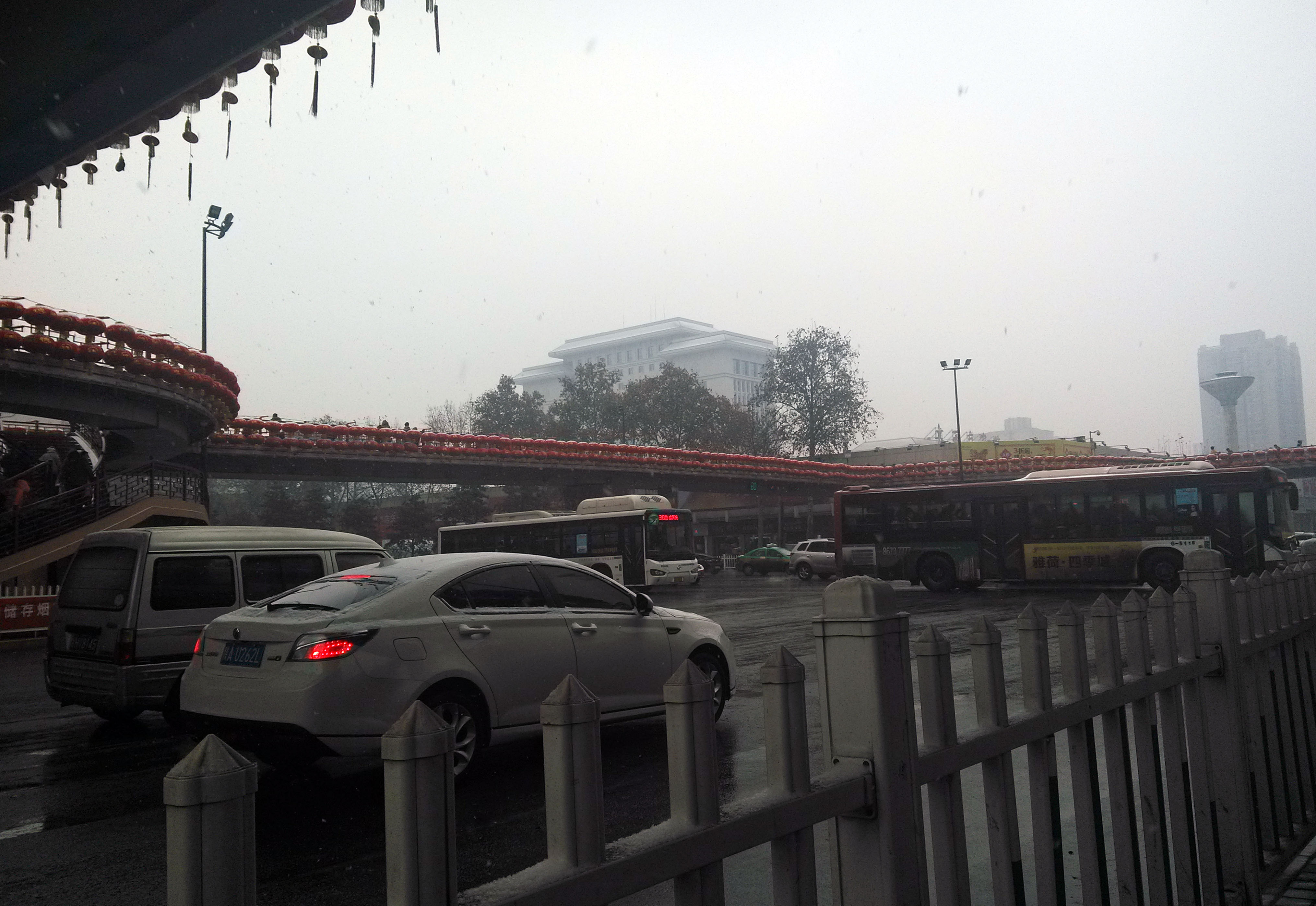 西安小寨十字